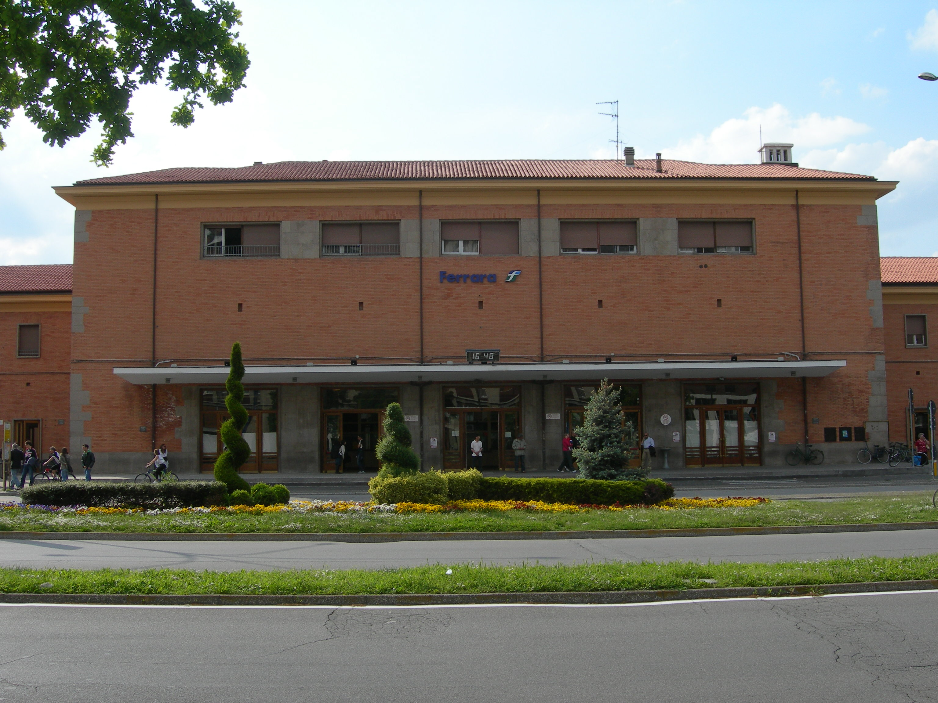 Stazione centrale a Ferrara